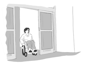 Equitable Use